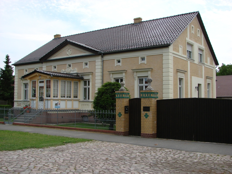 Der heutige "Storchenhof" ist der älteste Bauernhof in Nudow